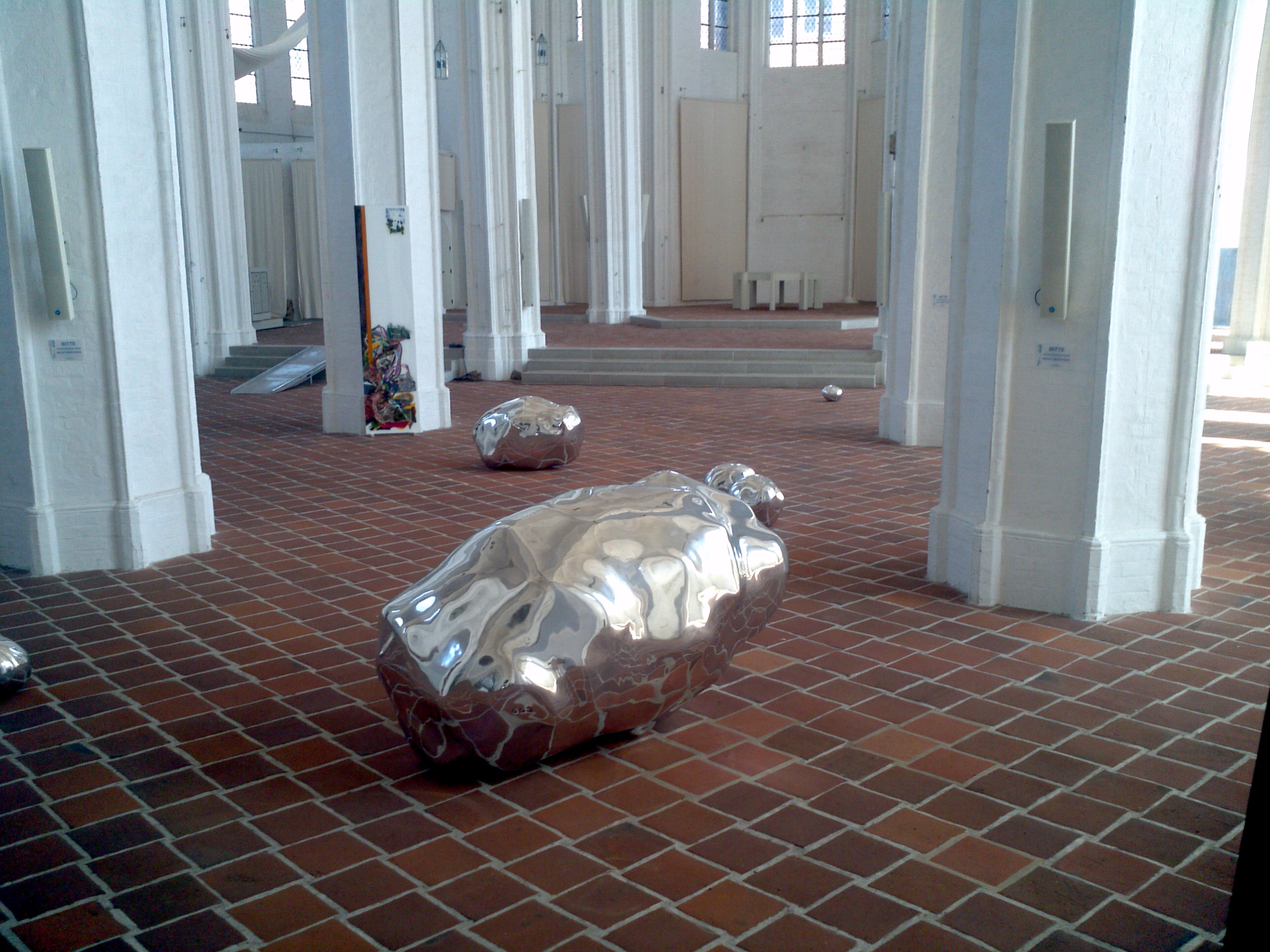 Wilhelm Mundts trashstones in St. Petri, Lübeck